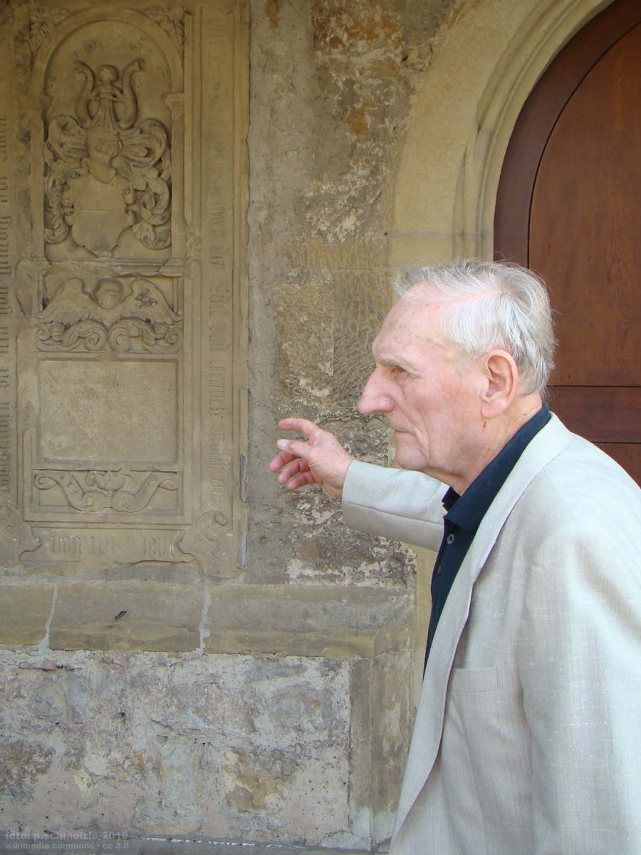 Hans Riexinger bei einer Führung an der Sebastianskirche in Kochendorf beim Denkmaltag 2010.